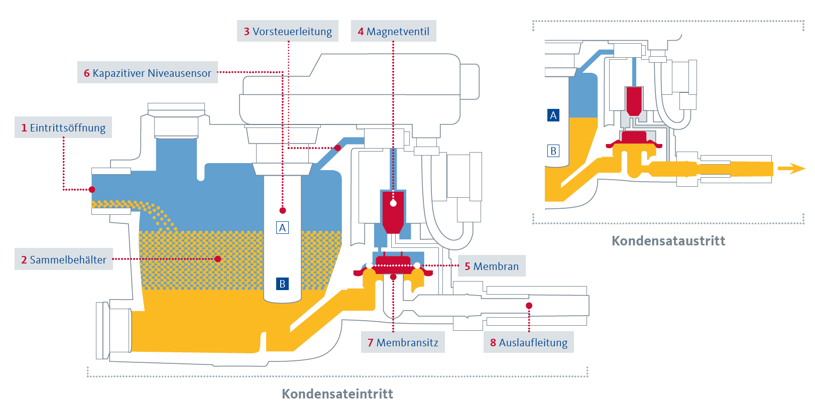 Das Kondensat tropft durch die Eintrittsöffnung (1) und sammelt sich im Behälter (2). Das Ventil ist zunächst geschlossen, da über die Vorsteuerleitung (3) und das Magnetventil (4) ein Druckausgleich oberhalb der Membran (5) erfolgt. Die größere Fläche über der Membran bewirkt eine hohe Schließkraft. Der Membransitz bleibt leckagefrei verschlossen. Hat sich der Behälter mit Kondensat gefüllt, sodass der kapazitive Niveausensor (6) am Maximumpunkt ein Signal meldet, schaltet das Magnetventil um und der Bereich über der Membran wird entlüftet. Durch den abnehmenden Druck oberhalb der Membran hebt sich diese vom Membransitz (7) ab, der Überdruck im Gehäuse drückt das Kondensat in die Auslaufleitung (8).